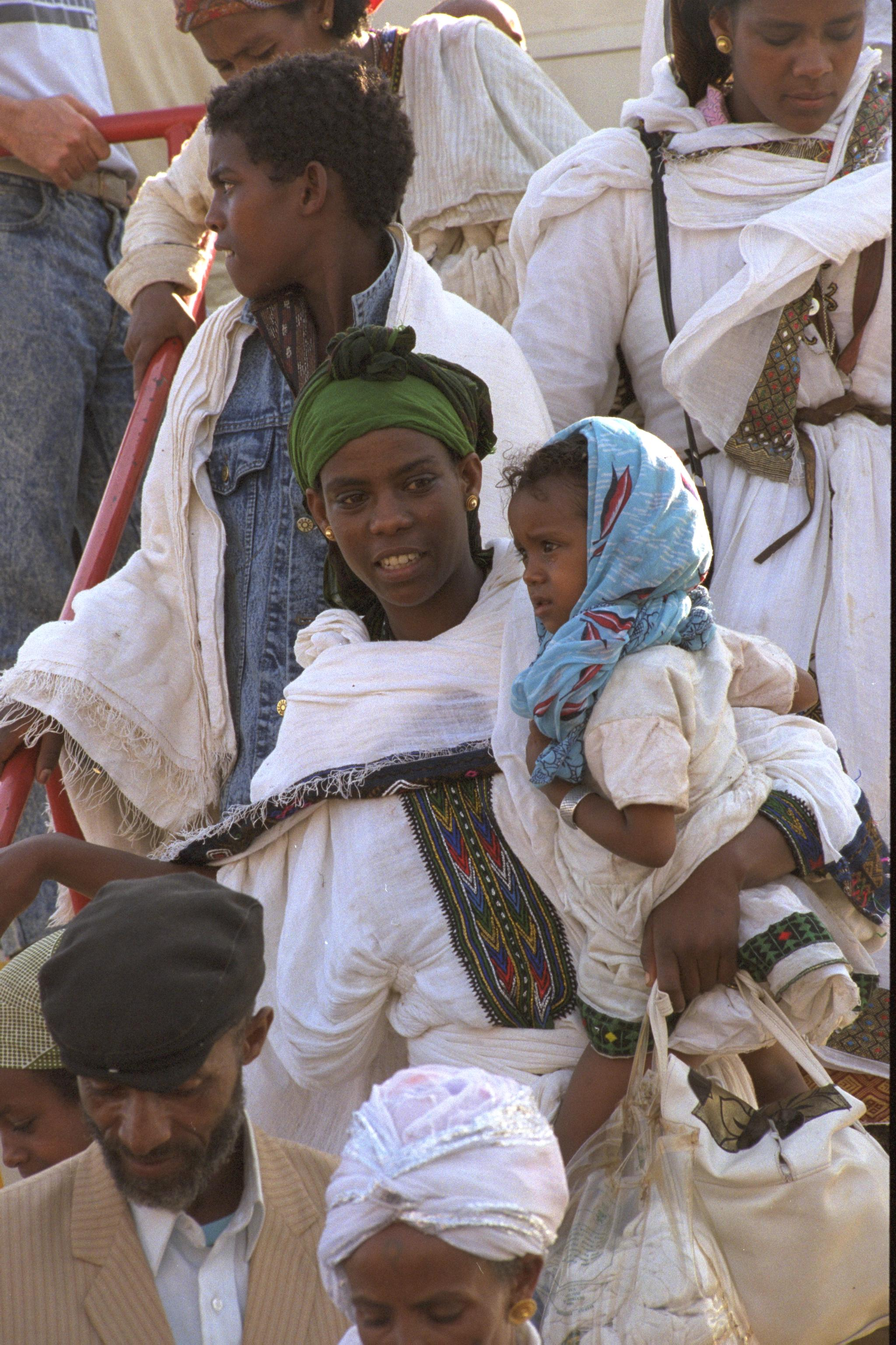 ETHIOPIAN IMMIGRANTS COMING OFF A BOEING JET AT AN AIR FORCE BASE AFTER ARRIVING ON OPERATION SOLOMON, FROM ADDIS ABABA. עולים חדשים מאתיופיה יורדים ממטוס לאחר הגעתם במסגרת מבצע שלמה מאדיס אבבה